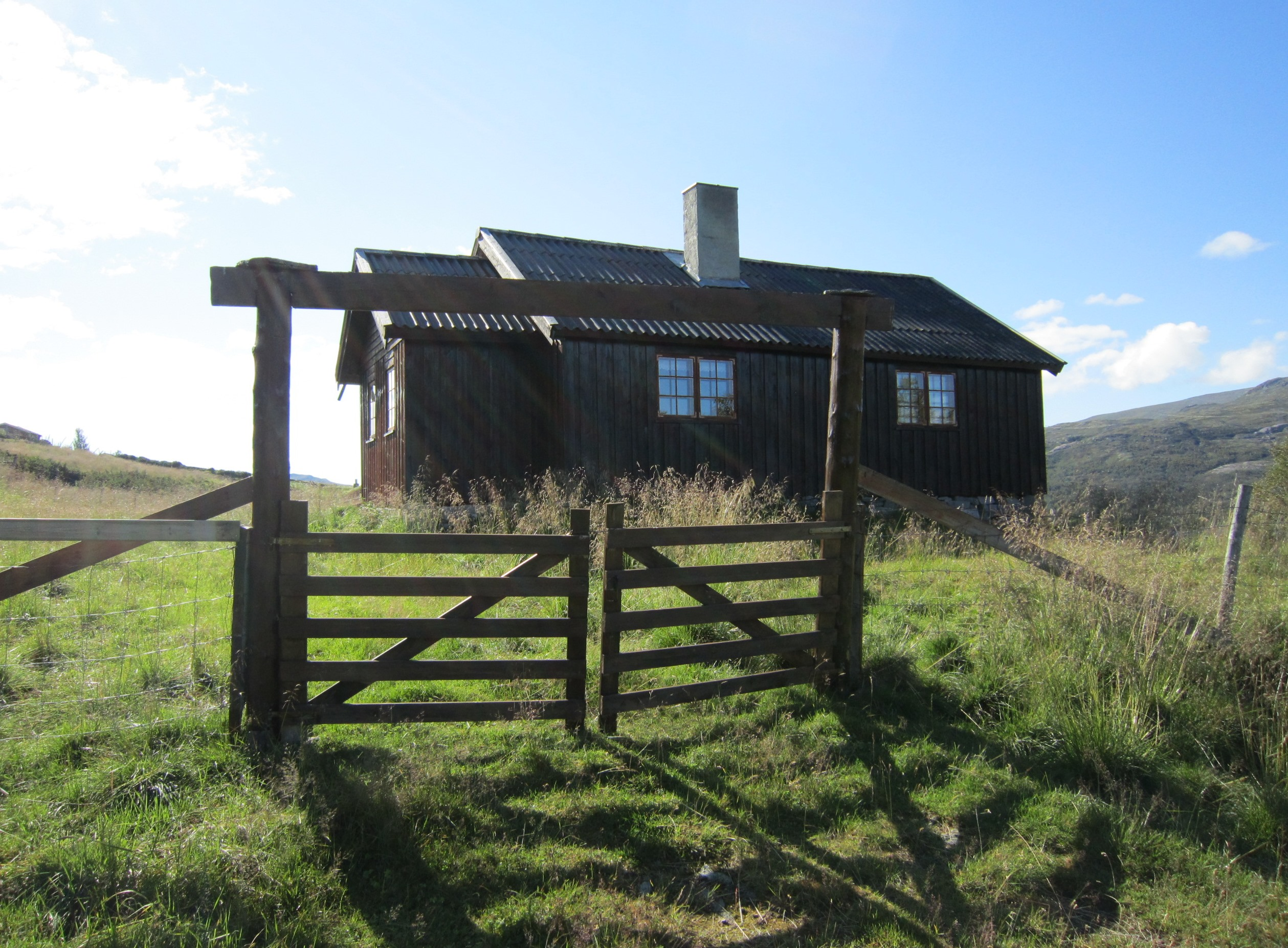 Sjong seterkapell, Lesja